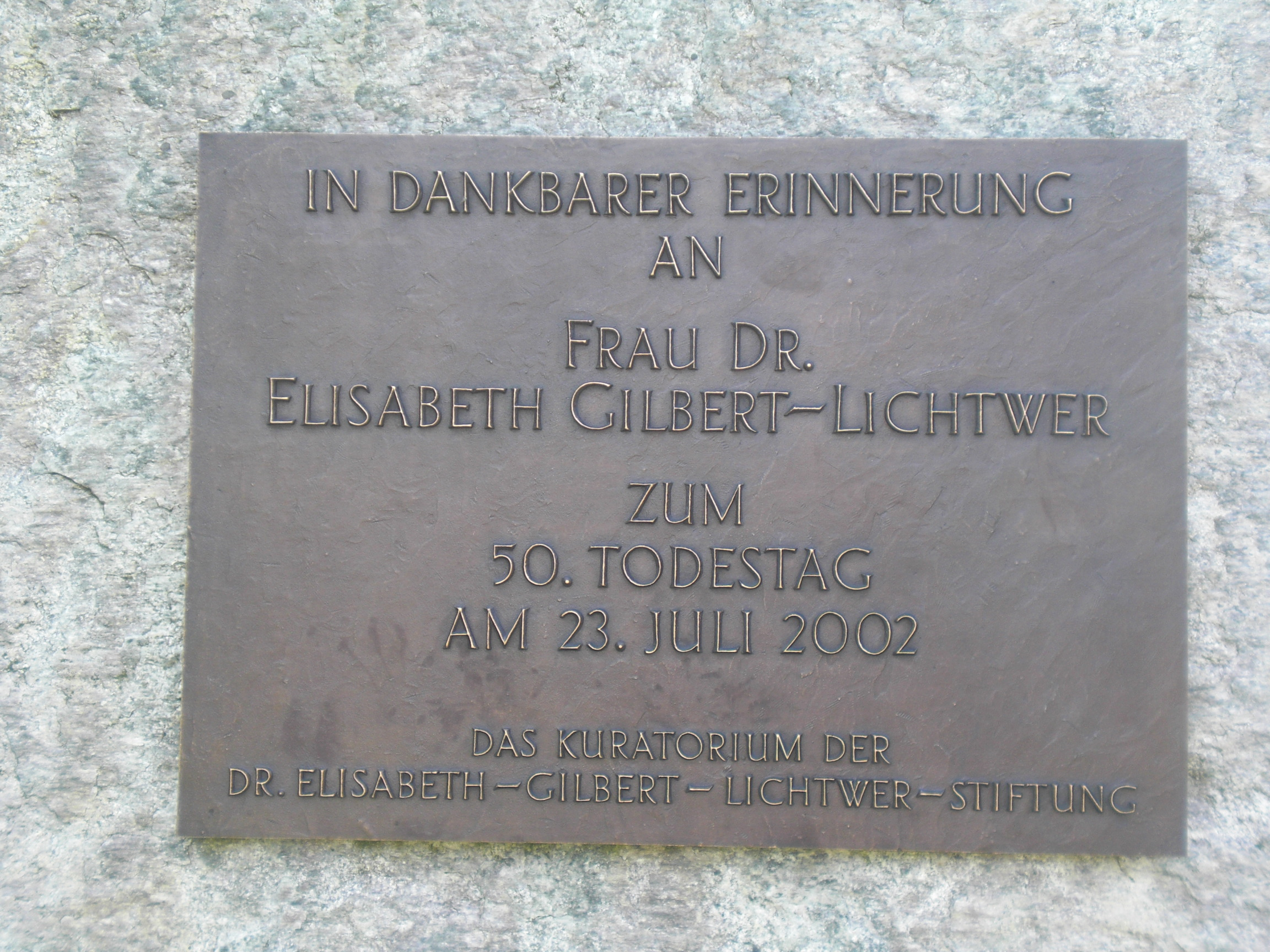 Gedenkplatte für Dr. Elisabeth Gilbert-Lichtwer auf der Rusel